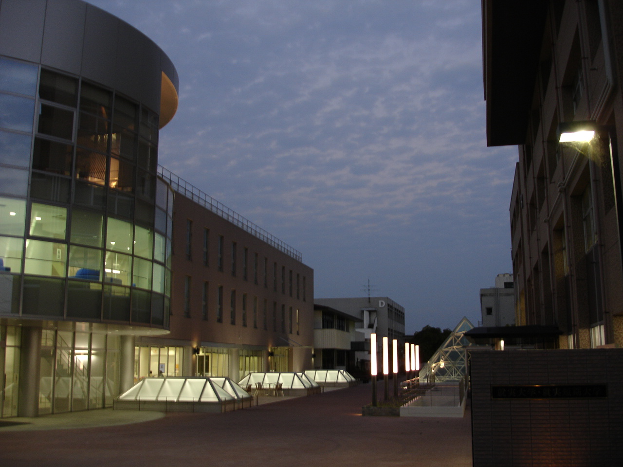 2005年9月28日撮影 就実大学